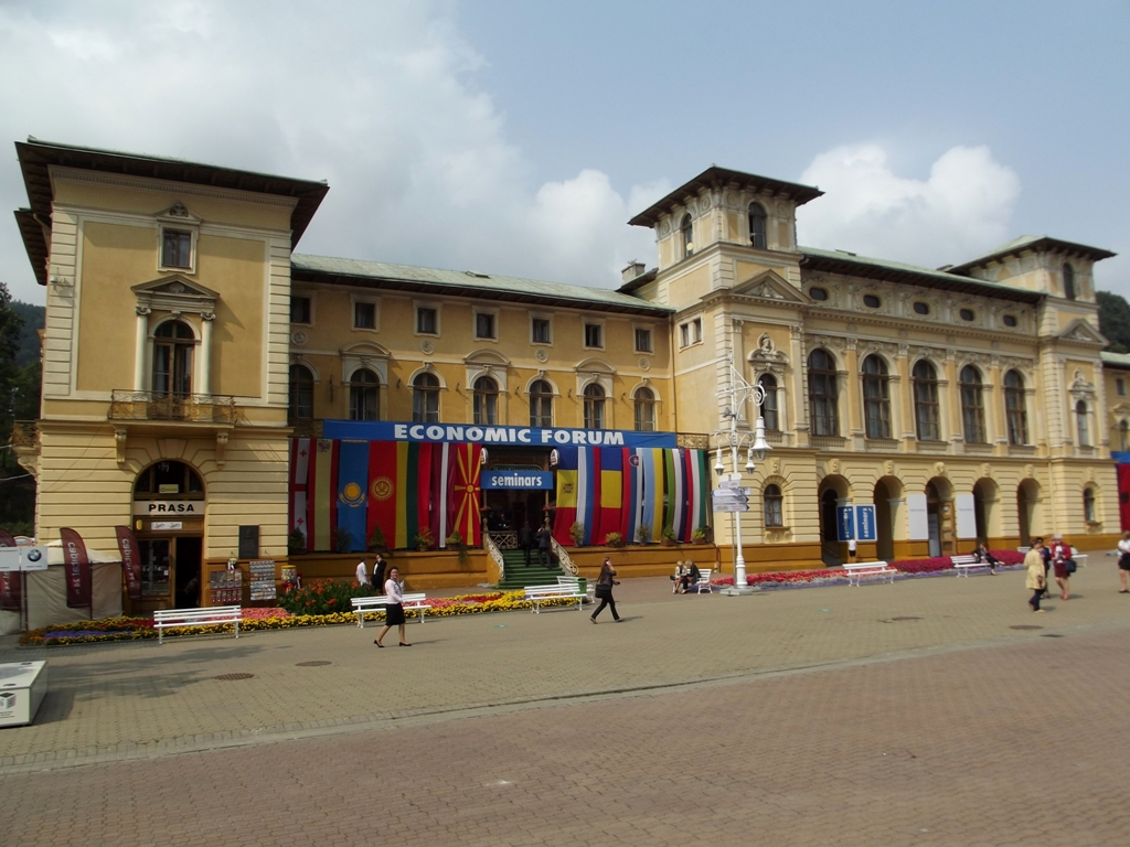 Zdjęcie zrobione podczas pierwszego dnia XXII Forum Ekonomicznego w Krynicy-Zdroju.